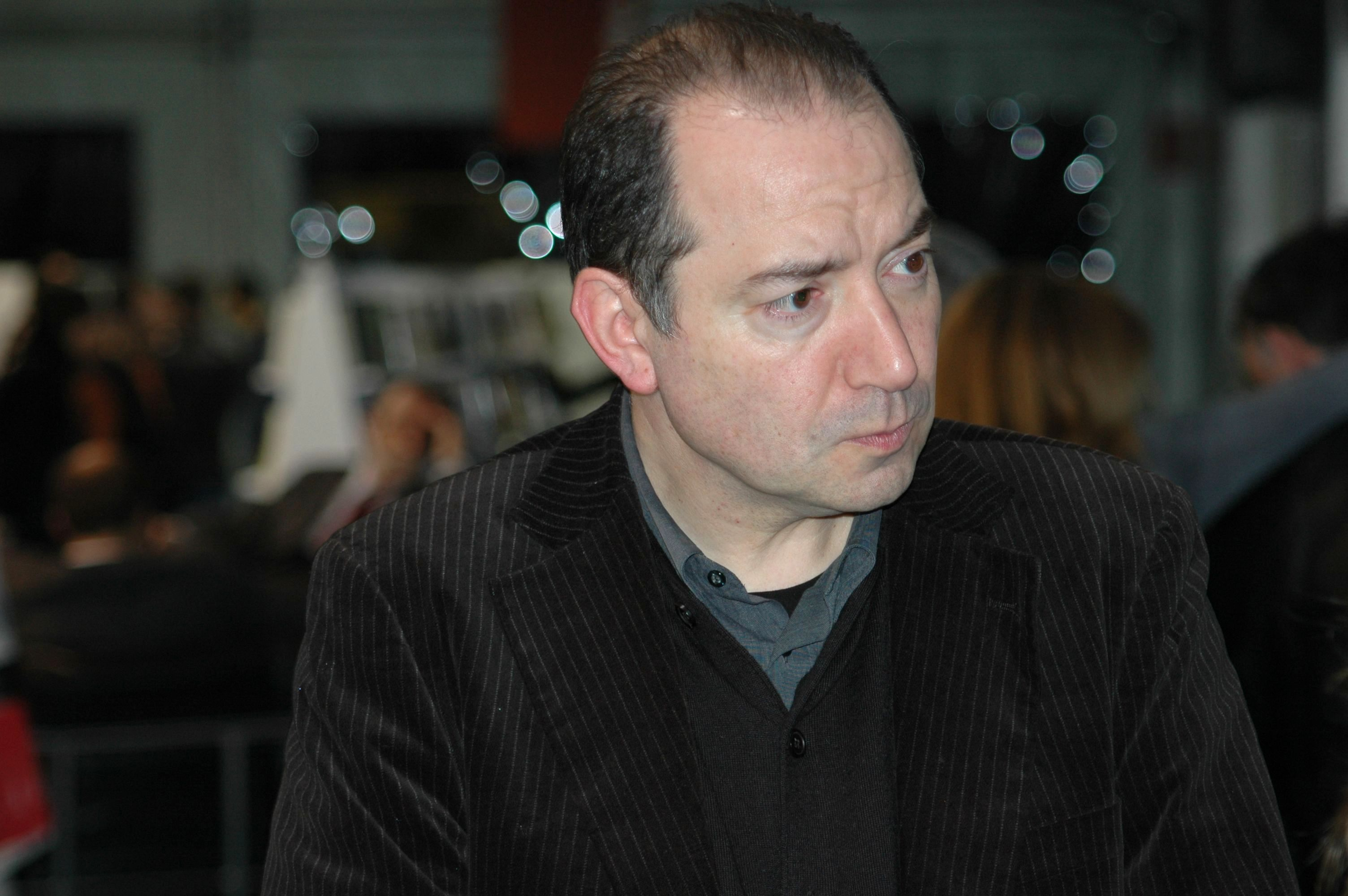 Vicent Sanchis i Llàcer